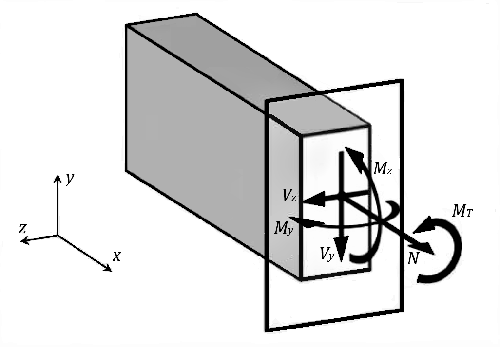 Barne esfortzuak kasu espazialean (3D)